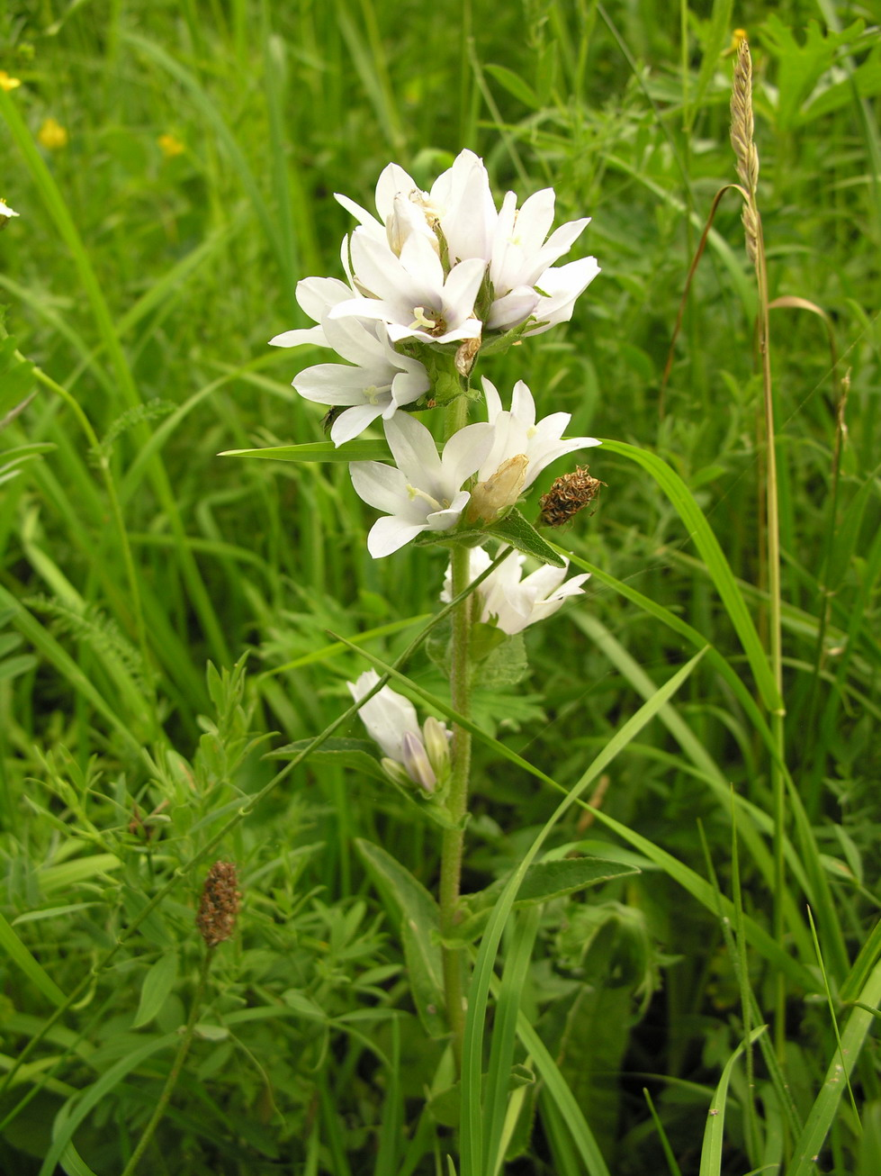 Tankiažiedis katilėlis (Campanula glomerata), baltažiedė forma Šeima. Katilėliniai (Campanulaceae) Foto: Algirdas, 2006 m. birželio 24 d., Lietuva